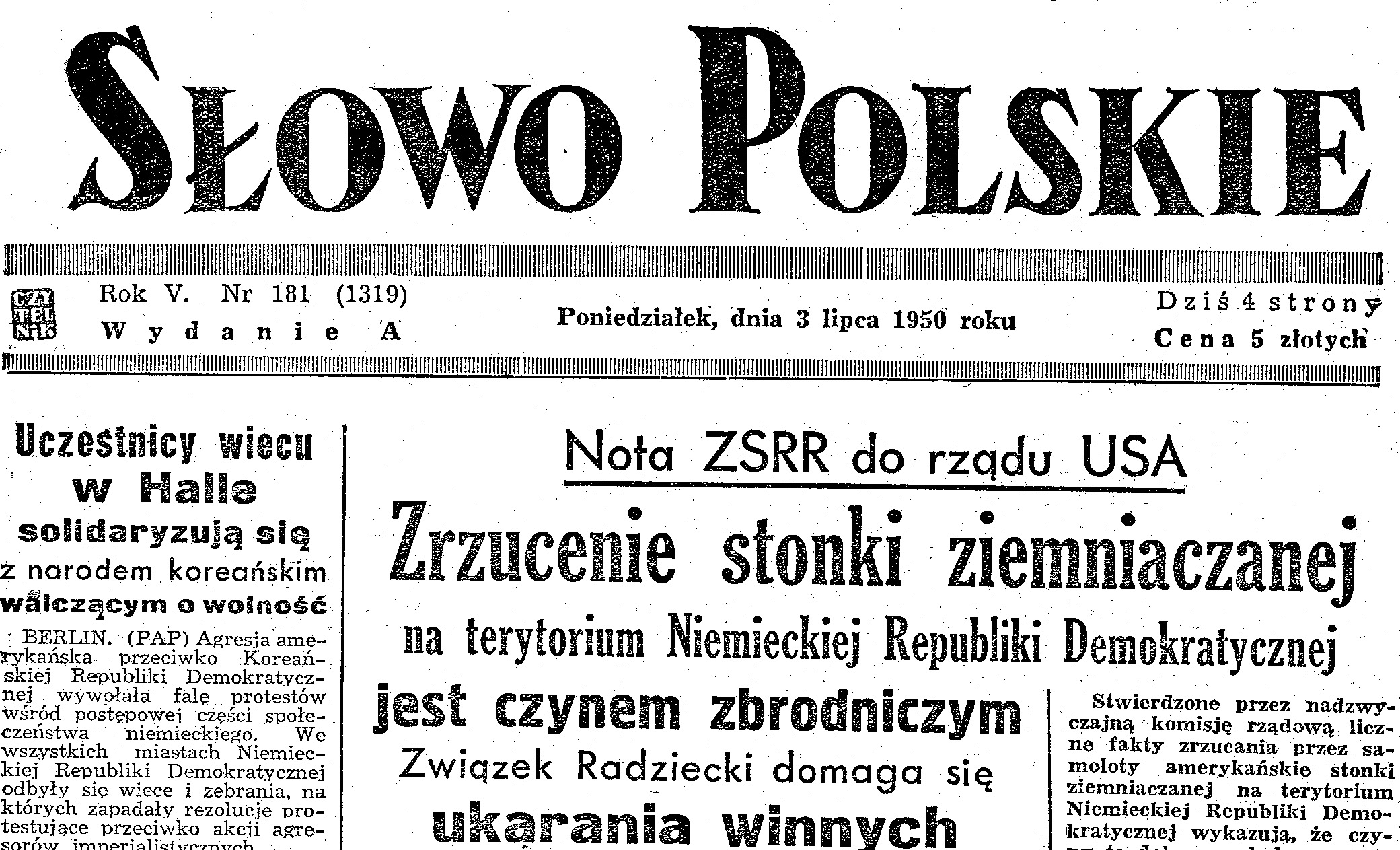 Słowo Polskie, wydanie z 1950 roku